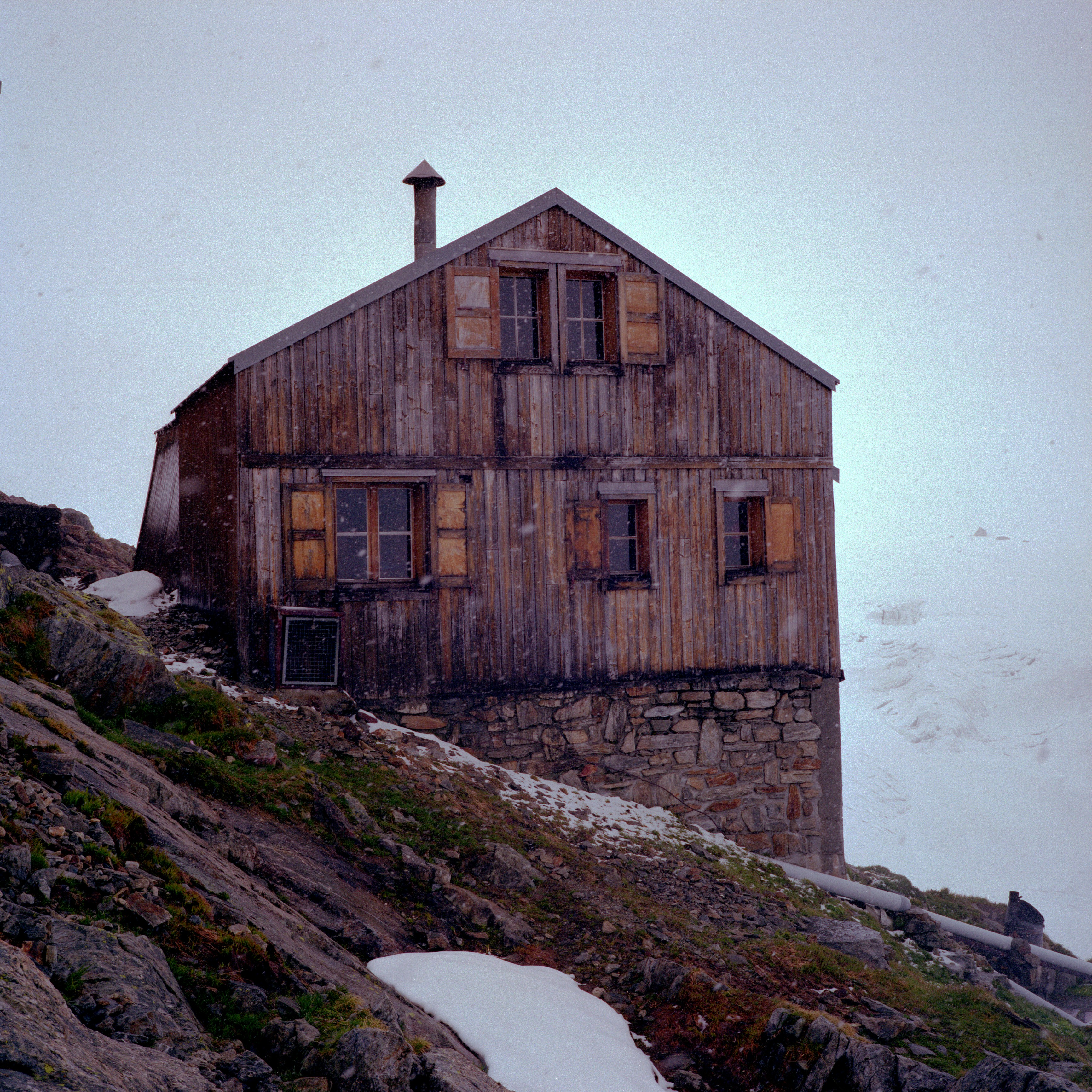 Ancien refuge Albert 1er